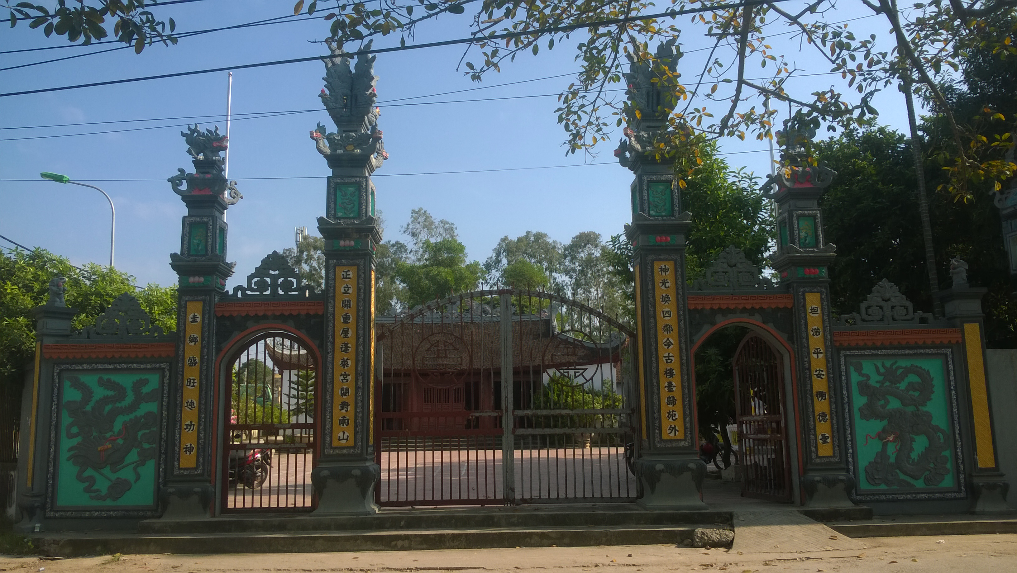 Đình Ném Đoài - phường Khắc Niệm, Bắc Ninh thờ sứ quân Nguyễn Thủ Tiệp thời vi:12 sứ quân